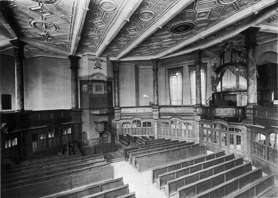 Innenraum der Wallonischen Kirche der Wallonisch-Niederländischen Doppelkirche in der Neustadt Hanau nach Südosten.